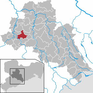 Königshain-Wiederau in Saxony - district Mittelsachsen